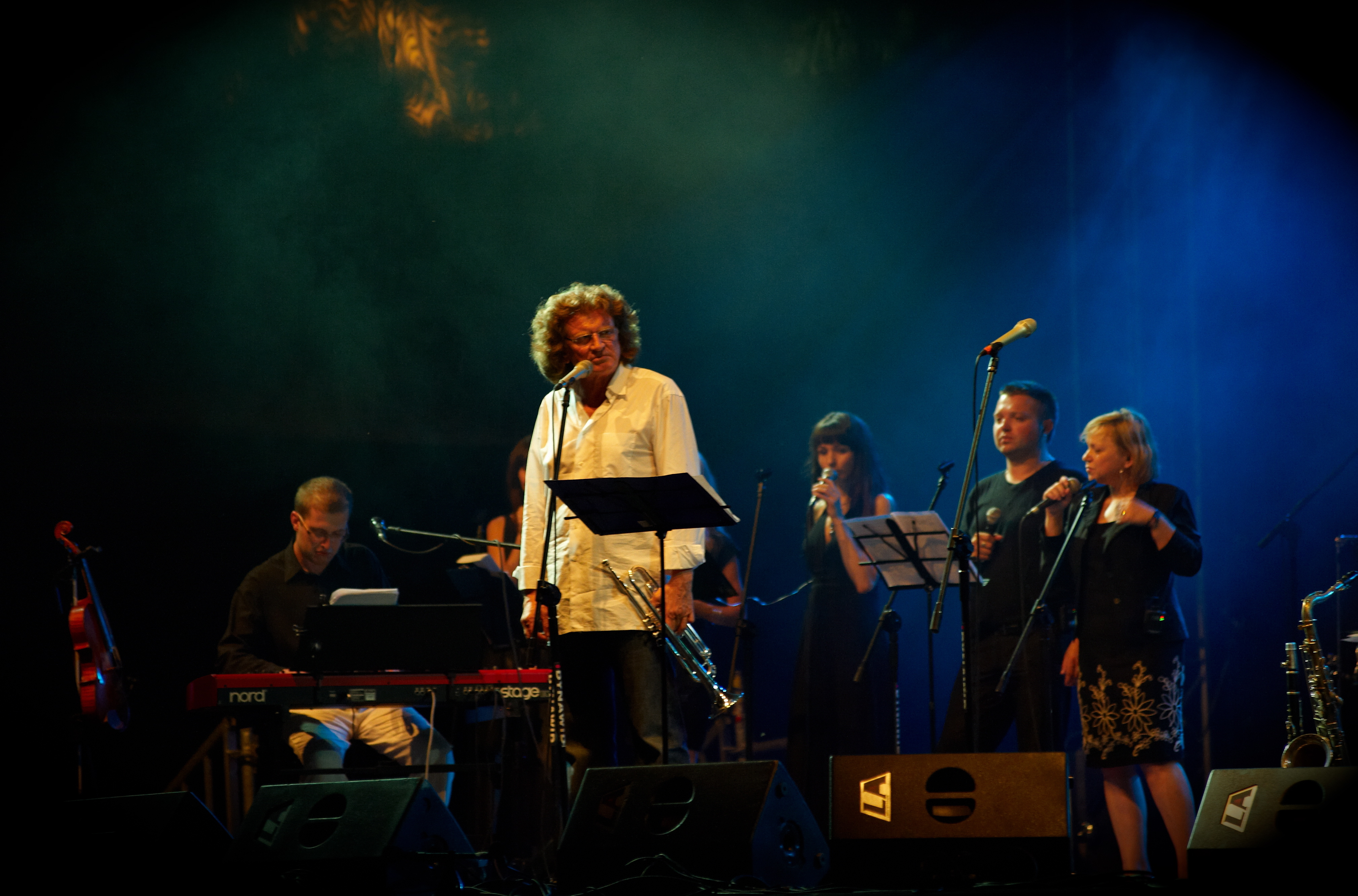 Śrubki - koncert Forty Kleparz 5